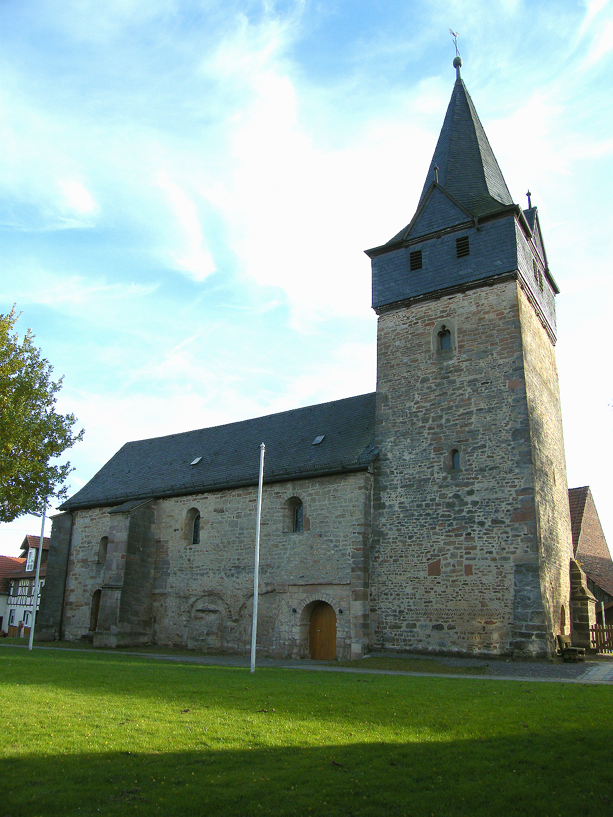 Romanische Kirche St. Georg Twistetal-Mühlhausen aus dem 12. Jahrhundert